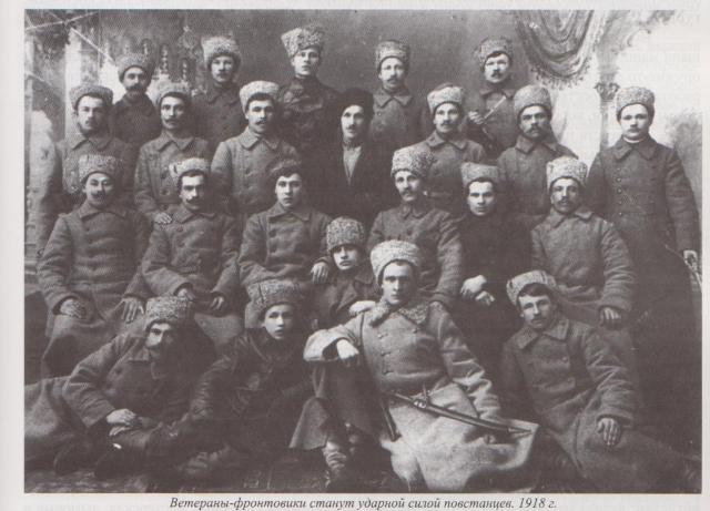 Союз фронтовиков Ижевск 1918 год